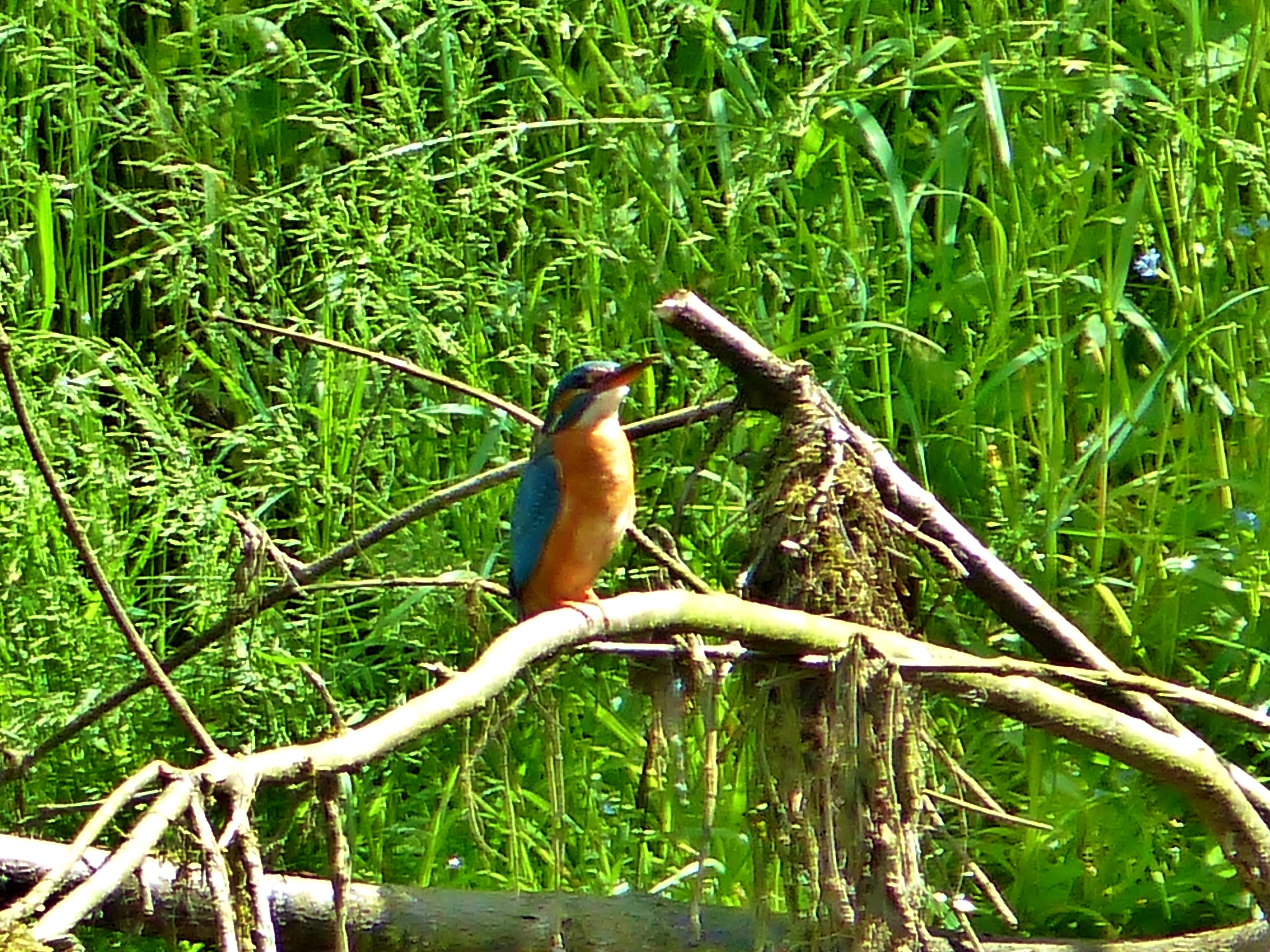 Eisvogel (Alcedo atthis) im Habitat Elstertal bei Berga/Elster